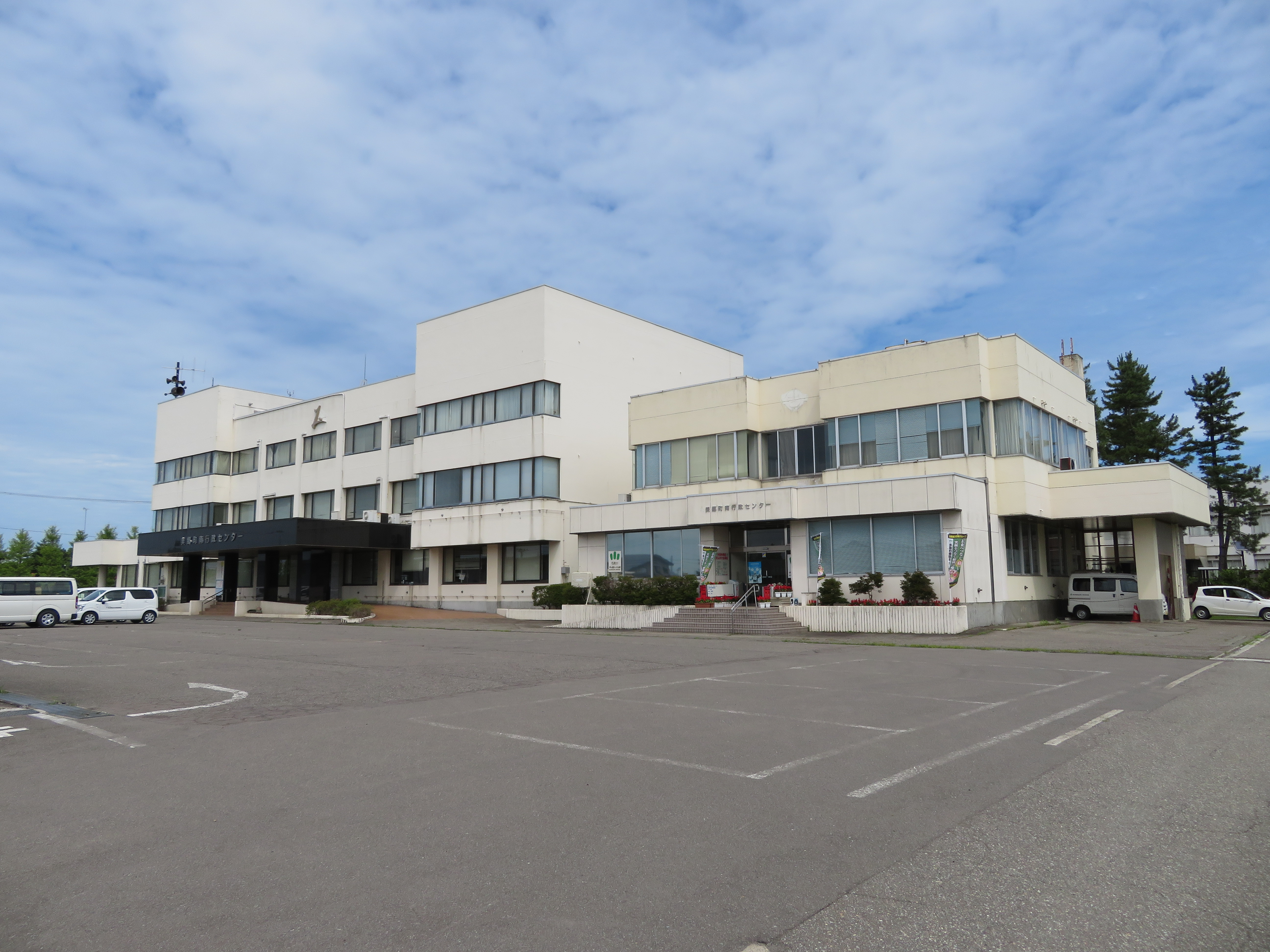 秋田県美郷町役場南行政センター庁舎（旧仙南村役場庁舎）